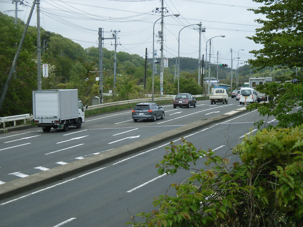 Miyagi Prefectural Road 27 Sendai-Kitakanjō Line. Sendai, Miyagi prefecture, Japan.